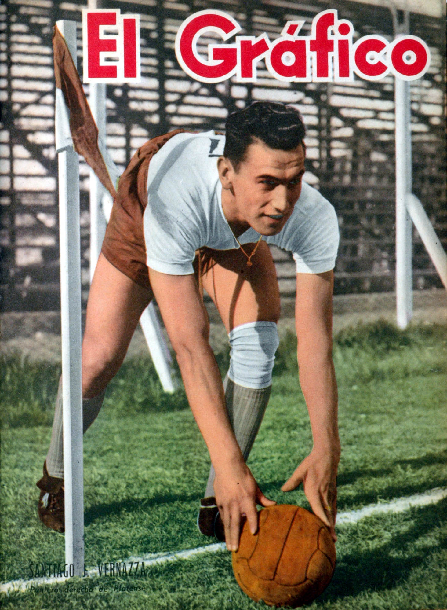 El Grafico del 02 de Septiembre de 1949. Edicion 1569